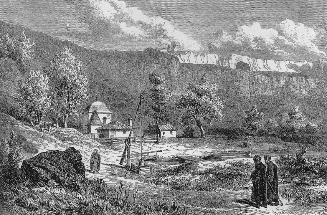 Изглед към Демир баба теке през 19 век, гравюра на Феликс Каниц (1829-1904)